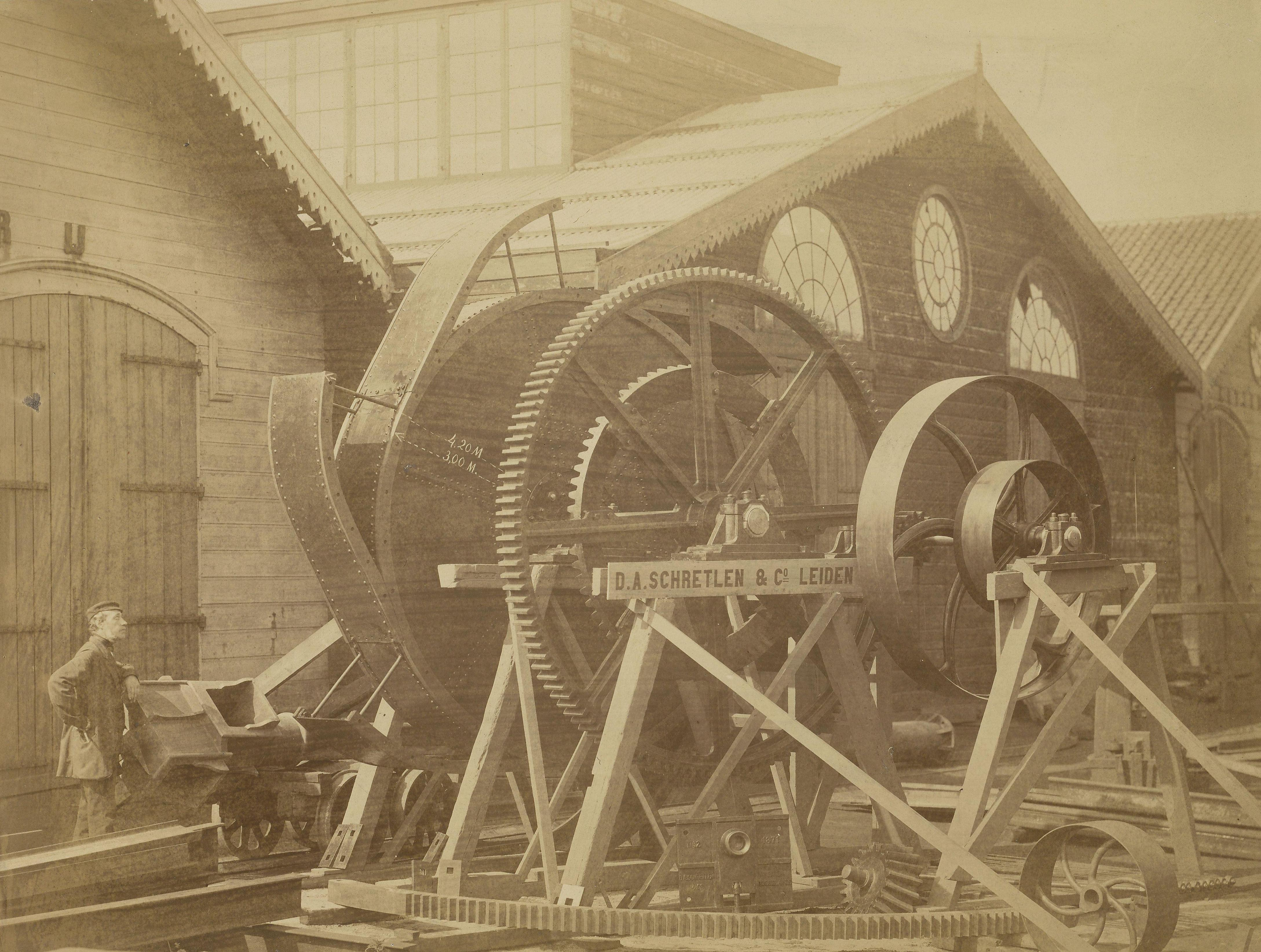 Het zogeheten scheprad van Overmars met daarachter een molenas, gereed liggend op het fabrieksterrein van de firma Schretlen & Co. te Leiden, 1871. Deze ijzergieterij en fabriek van werktuigen leverde veel molenassen. Het scheprad was een uitvinding van de Nederlandse waterbouwkundige H. Overmars. Het paste in het vernieuwingsstreven in die periode waarmee de traditionele windbemaling nieuw leven werd ingeblazen. Dit type scheprad vond ook in het buitenland toepassing. Fabriek van werktuigen en ijzergieterij van D.A. Schretlen & Co. Eind 19e eeuw